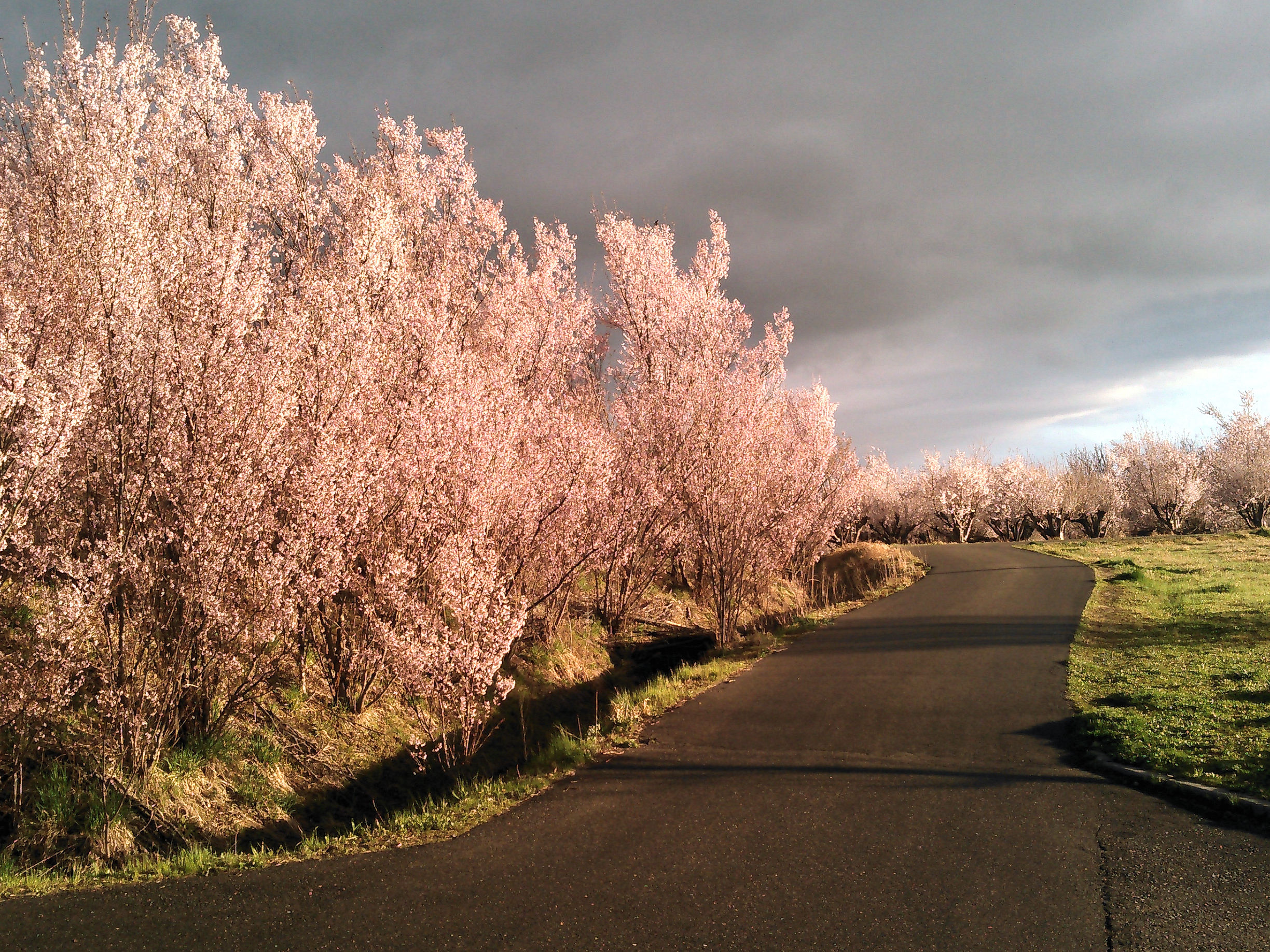 郡山市の花木団地の桜